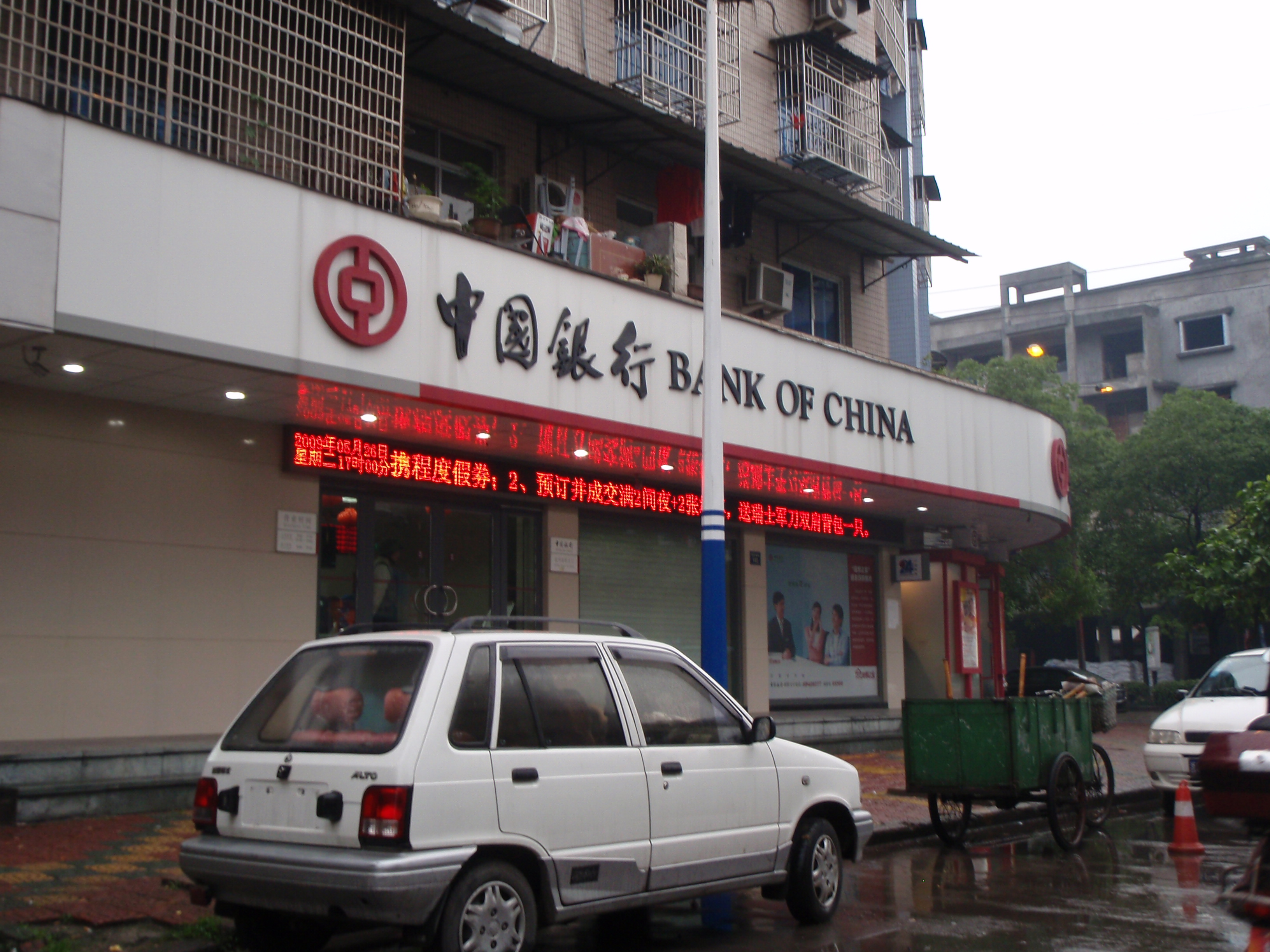 金虹西街的中国银行